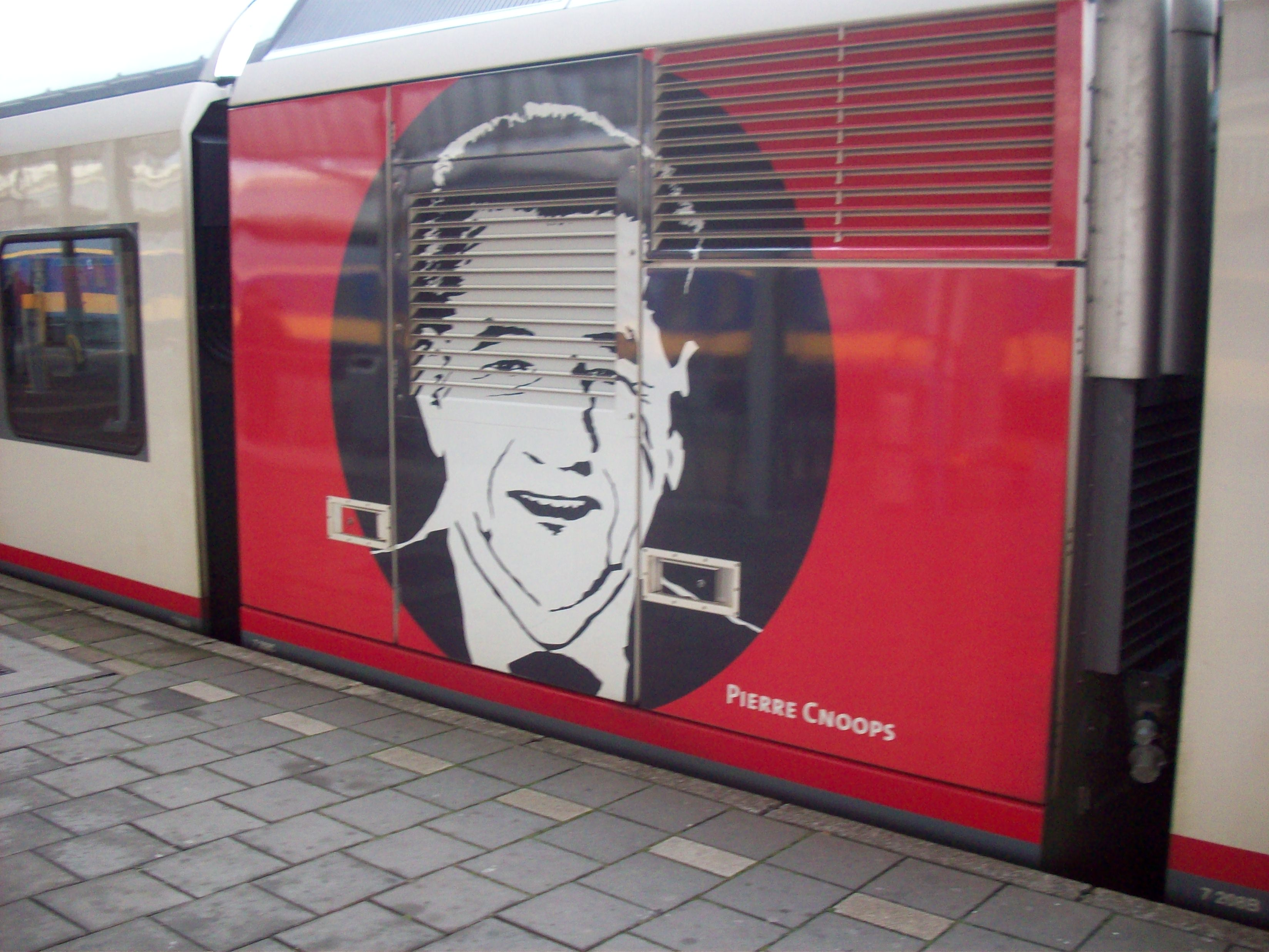 Velios GTW